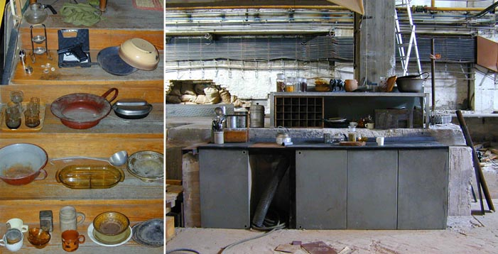 set design for Ainoa - props, set undressed.